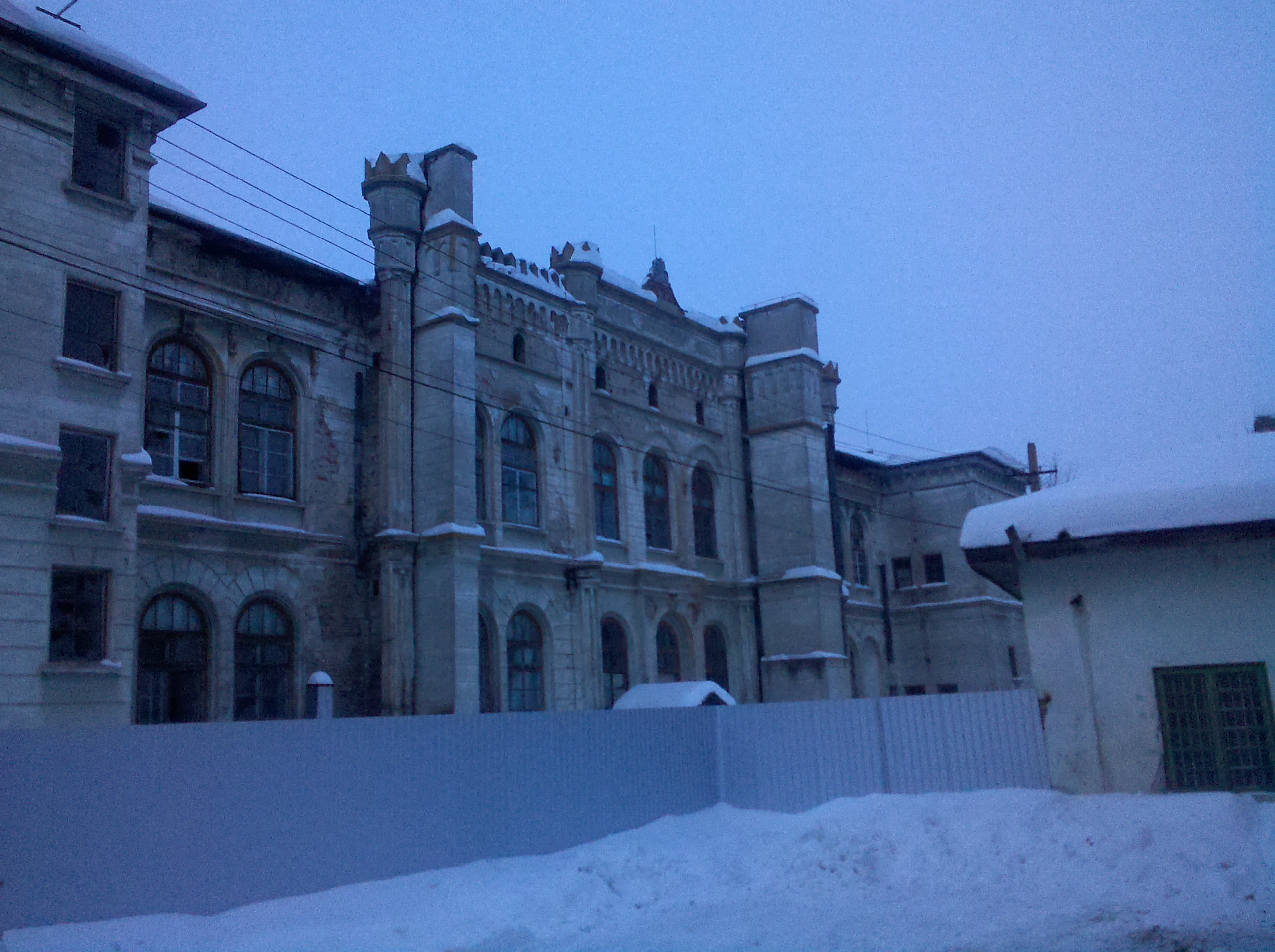 Ansamblul Spitalului Unificat